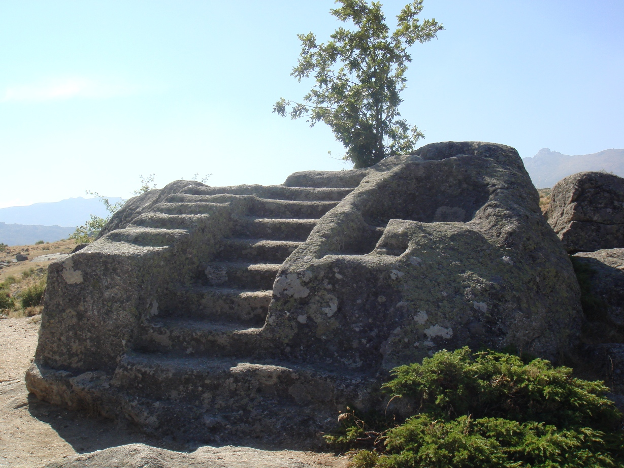 Altar de sacrificios del oppidum vettón de Ulaca (Ávila), ss. III-I a. C.